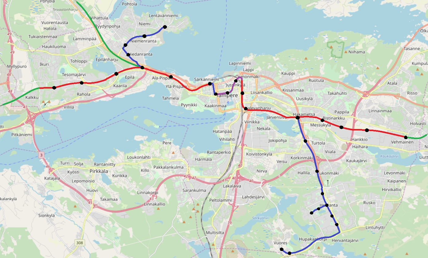 Kartassa on kuvattu suunnitellut ensimmäisen vaiheen pikaraitiotielinjat Tampereen seudulla. Punainen osuus tarkoittaa valtion rataverkkoa käyttävää linjausta, sininen erillistä maanpäällistä rataa, violetti keskustan tunneliosuutta sekä mustat pisteet pysäkkejä. Vihreät osuudet merkitsevät Kangasalan, Nokian ja Ylöjärven suuntiin tehtäviä laajennuksia tai ruuhka-ajan liikennettä.